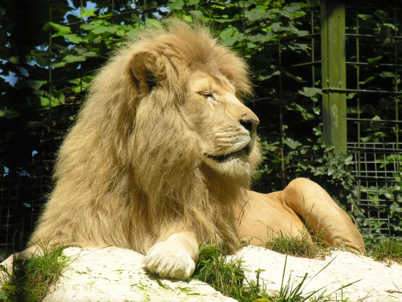 Lion au ZooParc de Beauval, Saint-Aignan, Loir-et-Cher, France